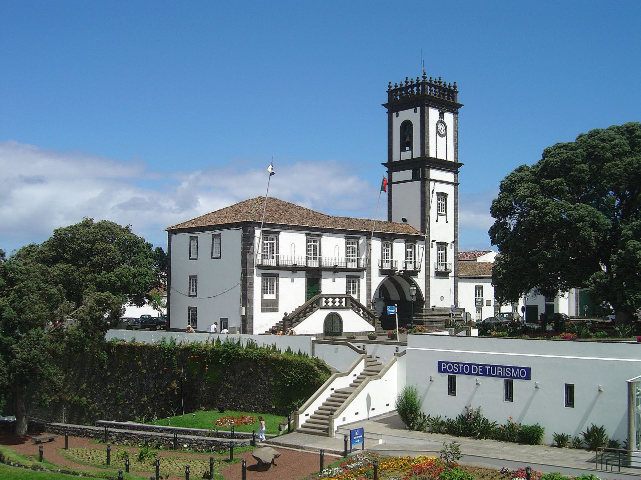 Ilha de S. Miguel